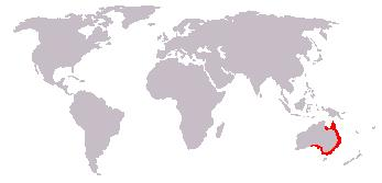 Bewerking afbeelding: afbeelding_(kaart).JPG